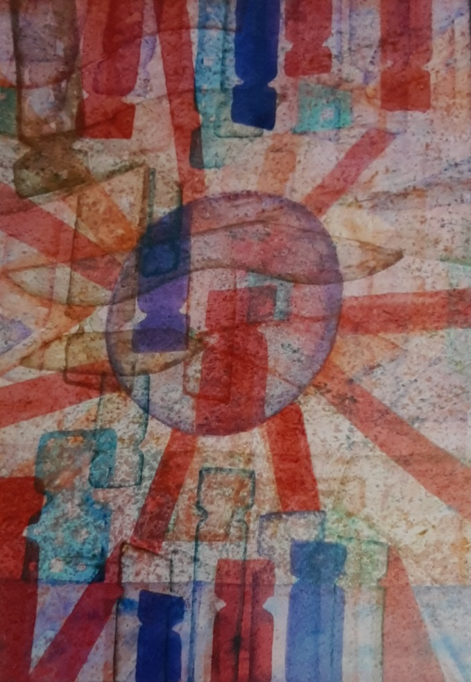 acquarello